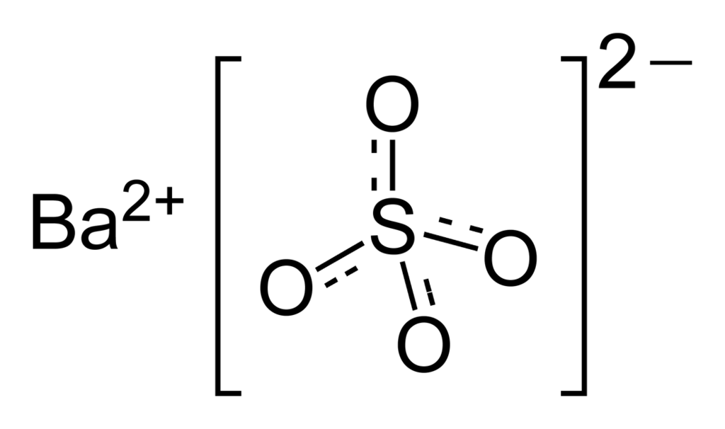 Barium sulfat